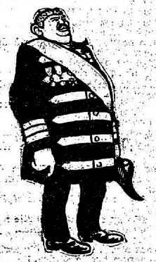 Abraham Heckelmann / Gekkelman (russ. Абрам Геккельман) alias A. Landesen (russ. А.Ландезен) alias Arkadi Michailowitsch Harting (russ. Аркадий Михайлович Гартинг) (1861-after 1910), russian secret agent